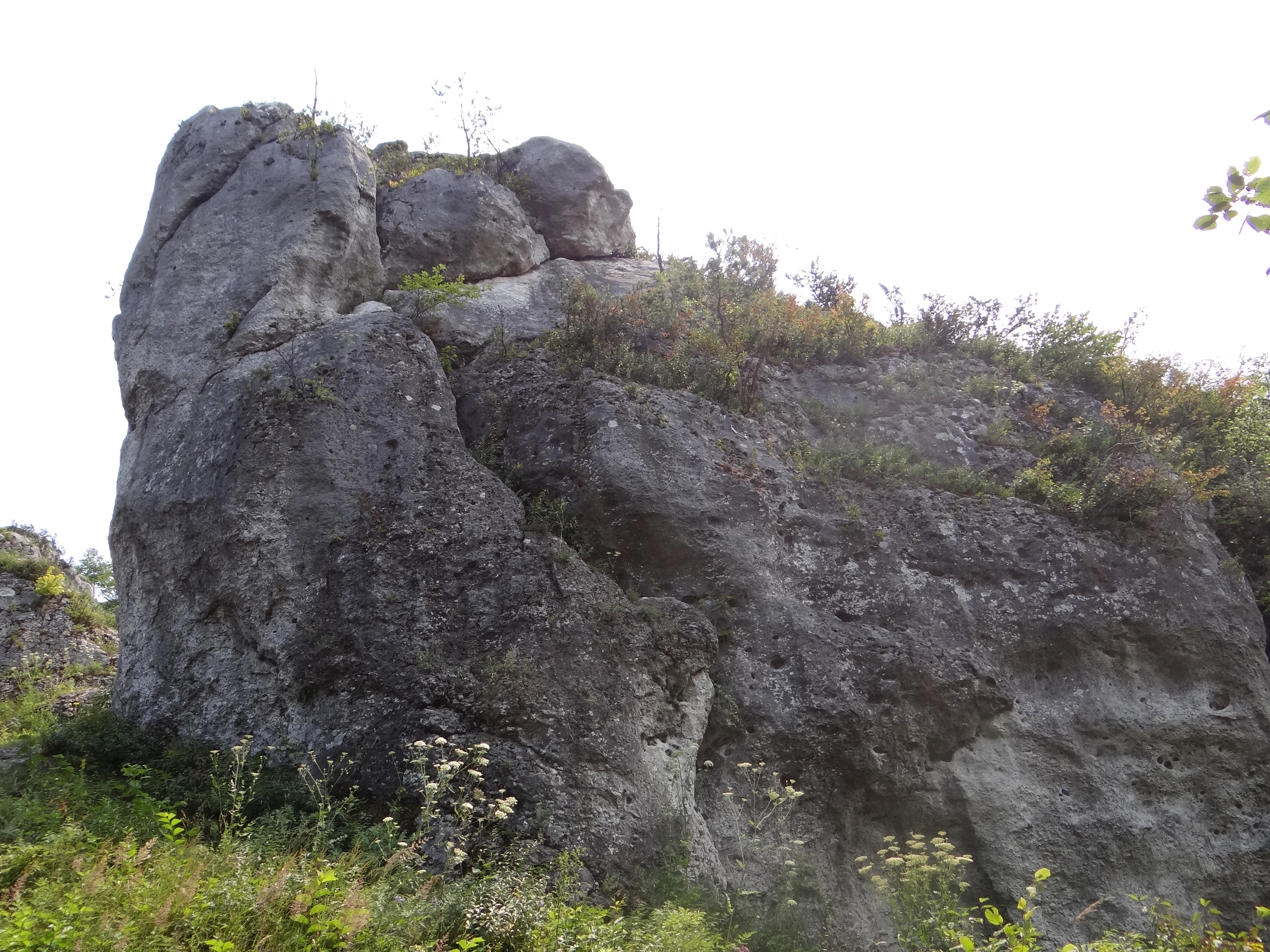 Dolna Baszta na Górze Zborów w Podlesicach (ściana zachodnia